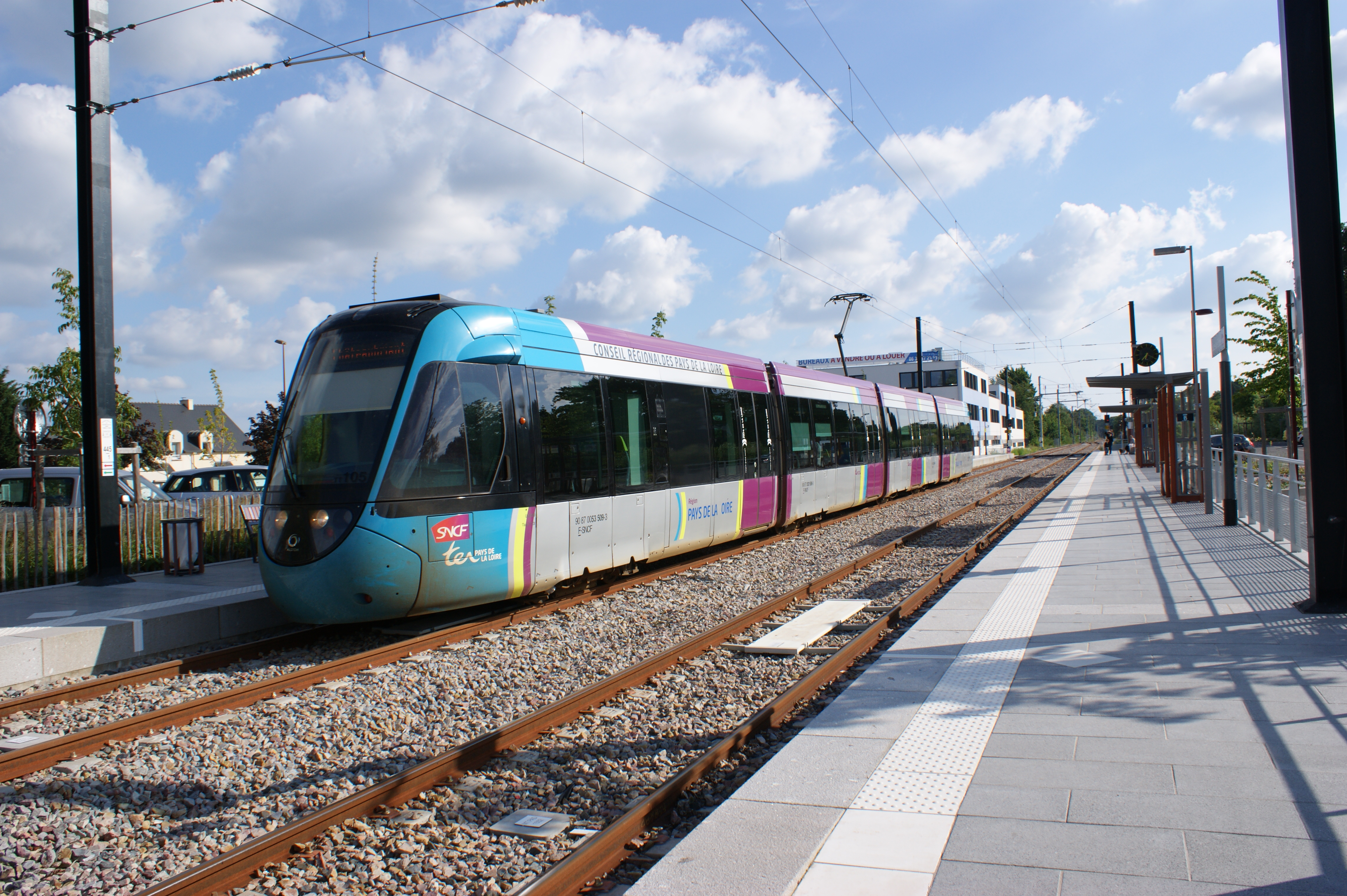 Gare de Sucé-sur-Erdre, tram train, venant de Nantes, à quai.